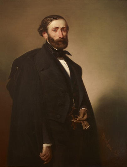 Ritratto di Giovanni Juva, olio su tela, 121 x 93 cm, Galleria d'Arte moderna, Milano